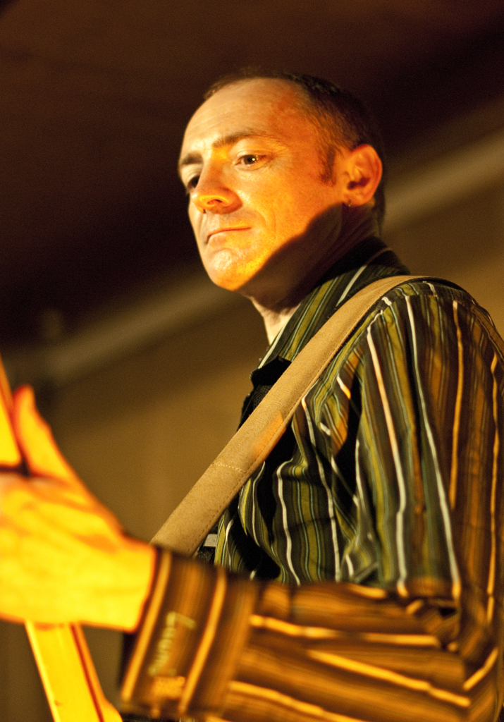 Gallon Drunk